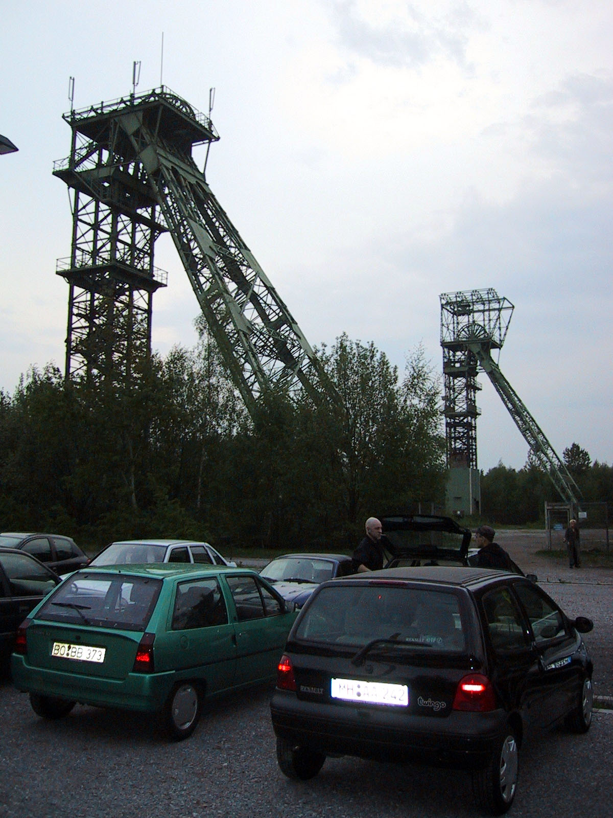 Fördertürme der ehemaligen Zeche Zweckel Mining shaft of the old coal mine Zweckel Date: May 2005, Gladbeck, Germany Author: Maschinenjunge Licence: cc-by-sa-2.5